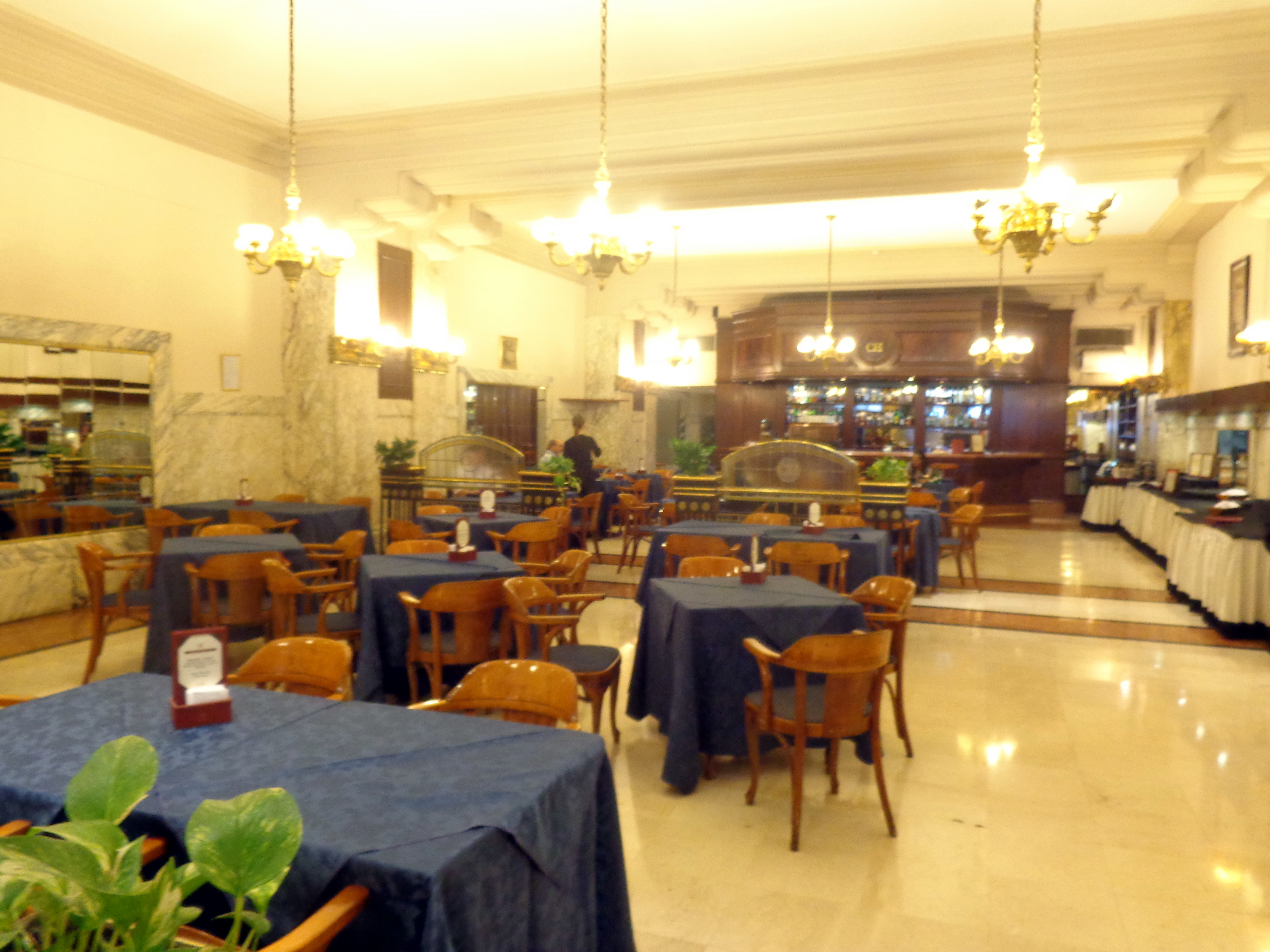 Bar en Hotel Castelar, en Monserrat, Buenos Aires, Argentina.